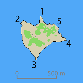 Pobřežní útvary ostrova Kräsuli.